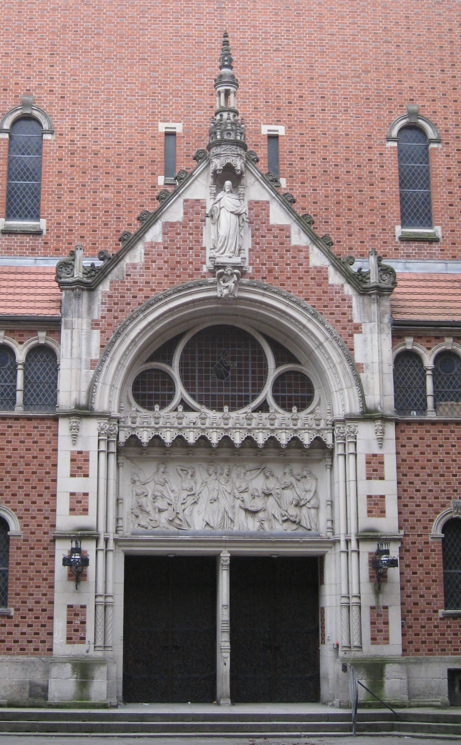 Hauptportal der Marthakirche Berlin